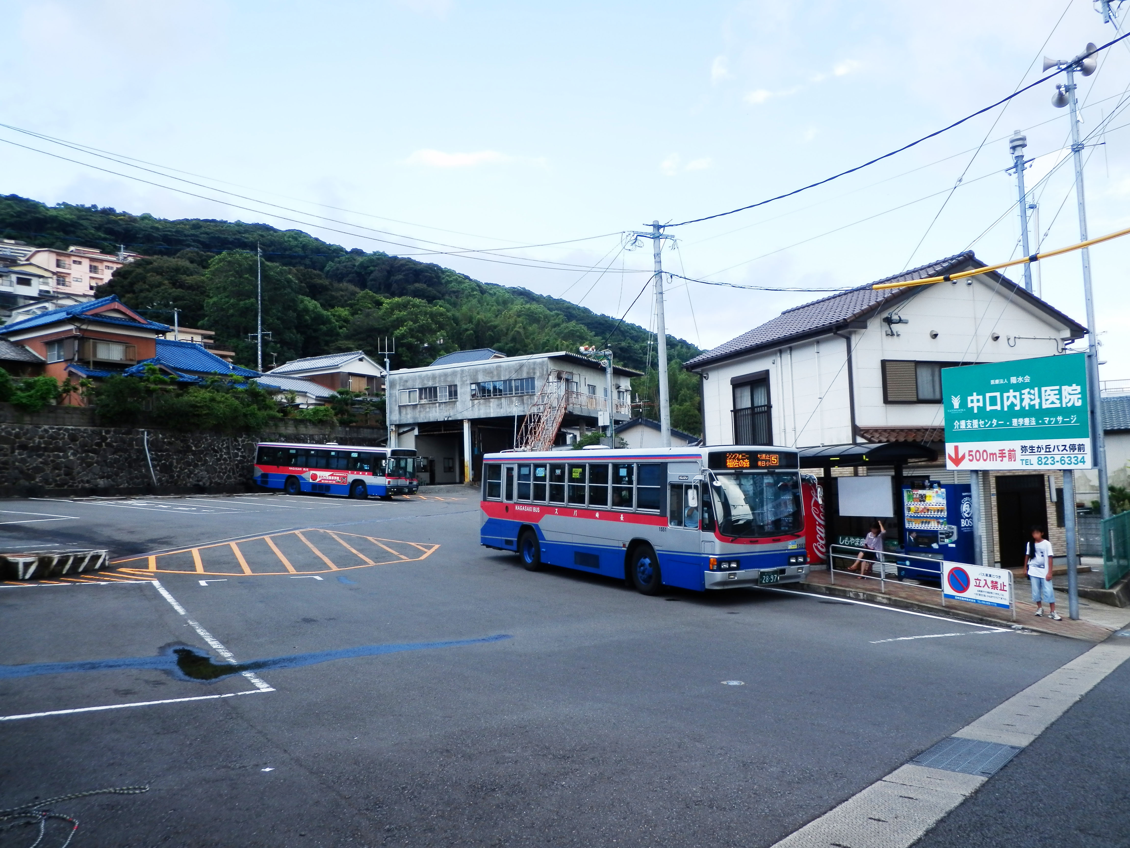 長崎バス田上営業所跡（車庫）